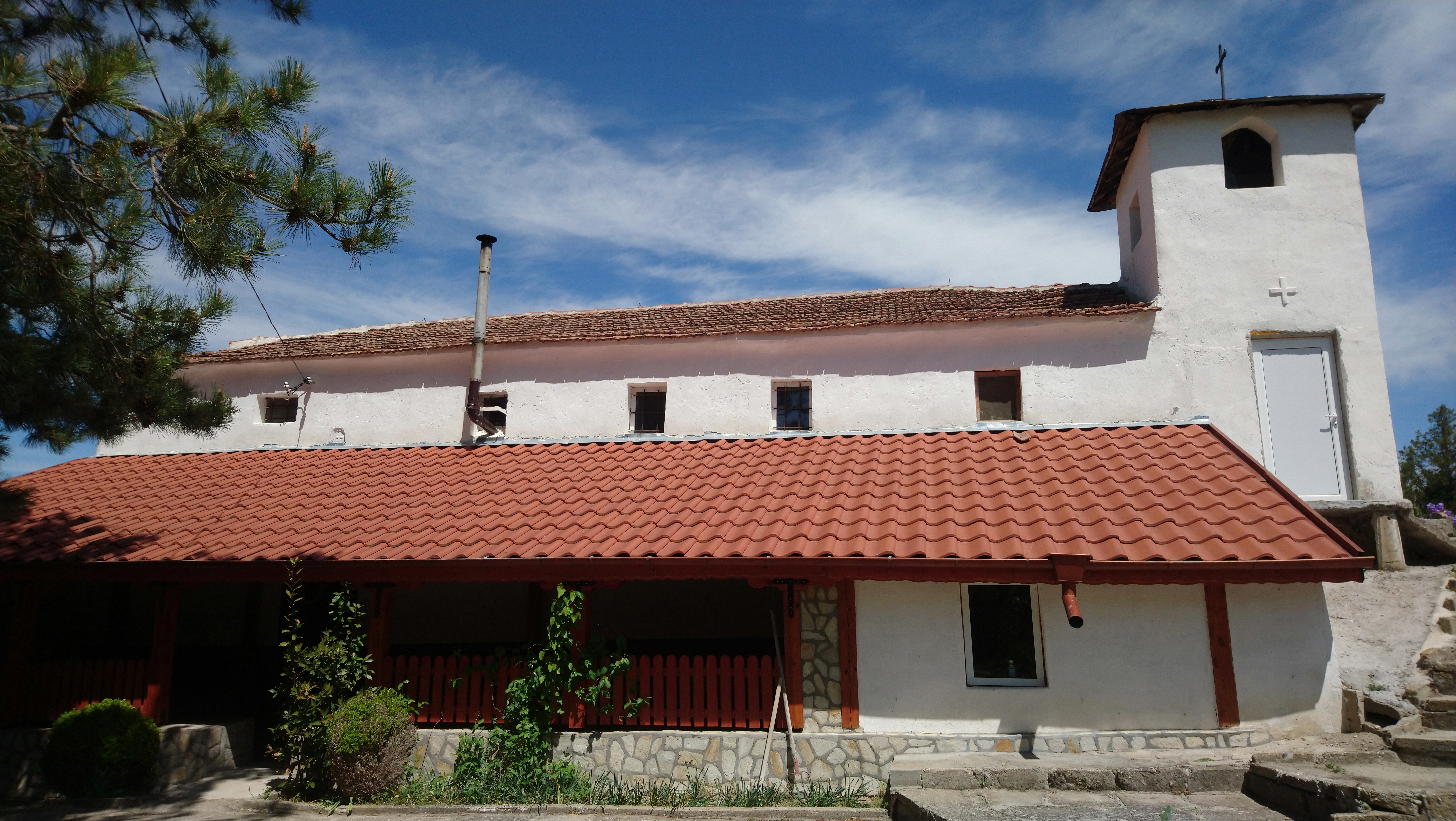 Църквата Св Георги в село Долно Спанчево